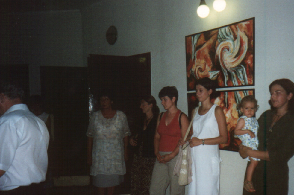 Hamza Studio-Tűz, Jászberény